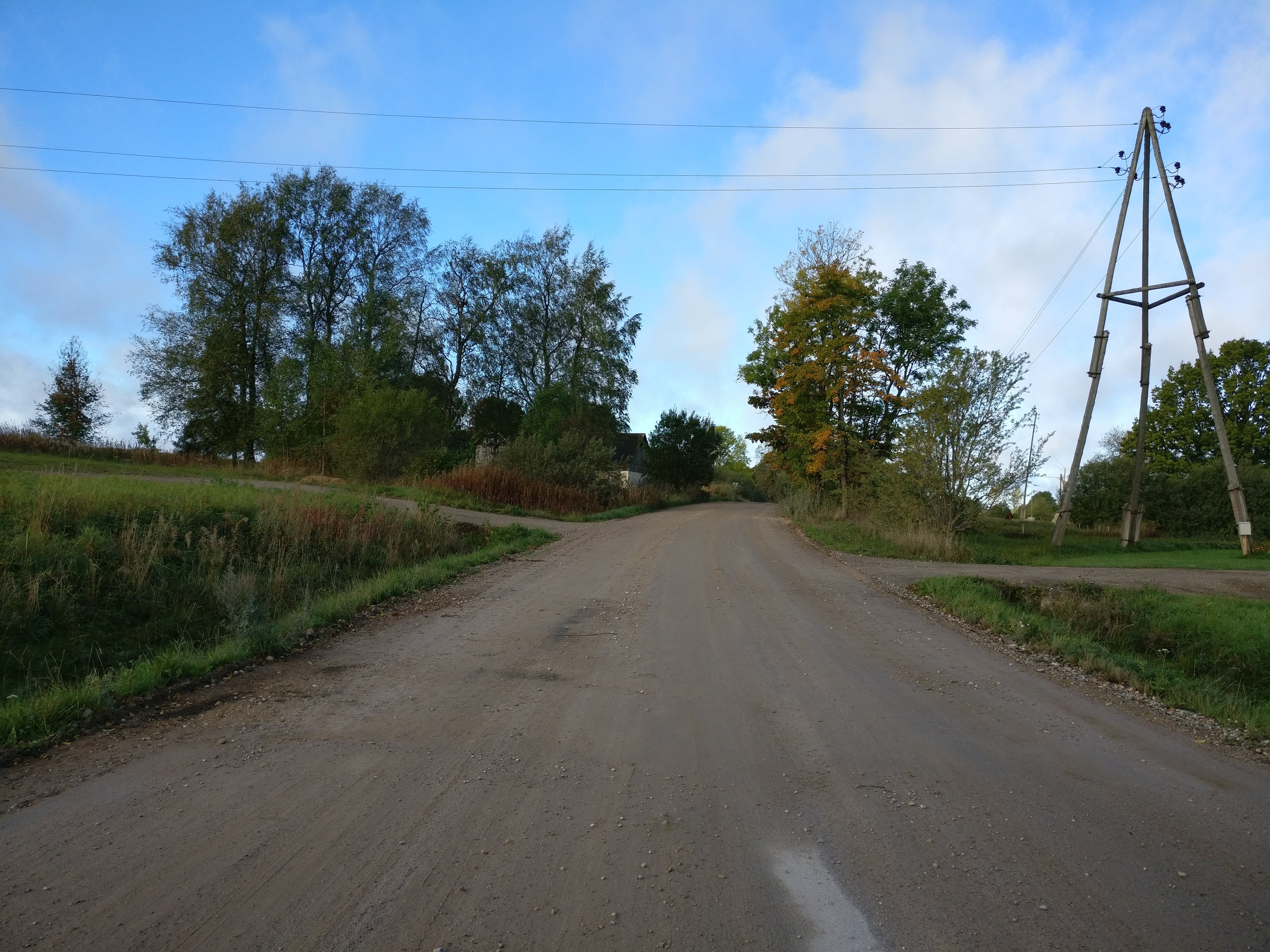 Krustakrogs